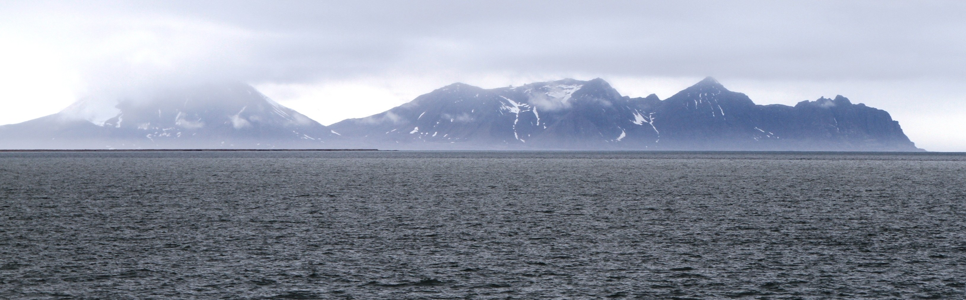 Fuglehuken of Forlandet, Cultural heritage site at the coast of Prins Karls Forland, western Spitsbergen, Svalbard.